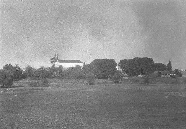 Беларуская (тарашкевіца): Беніца (Bienica)